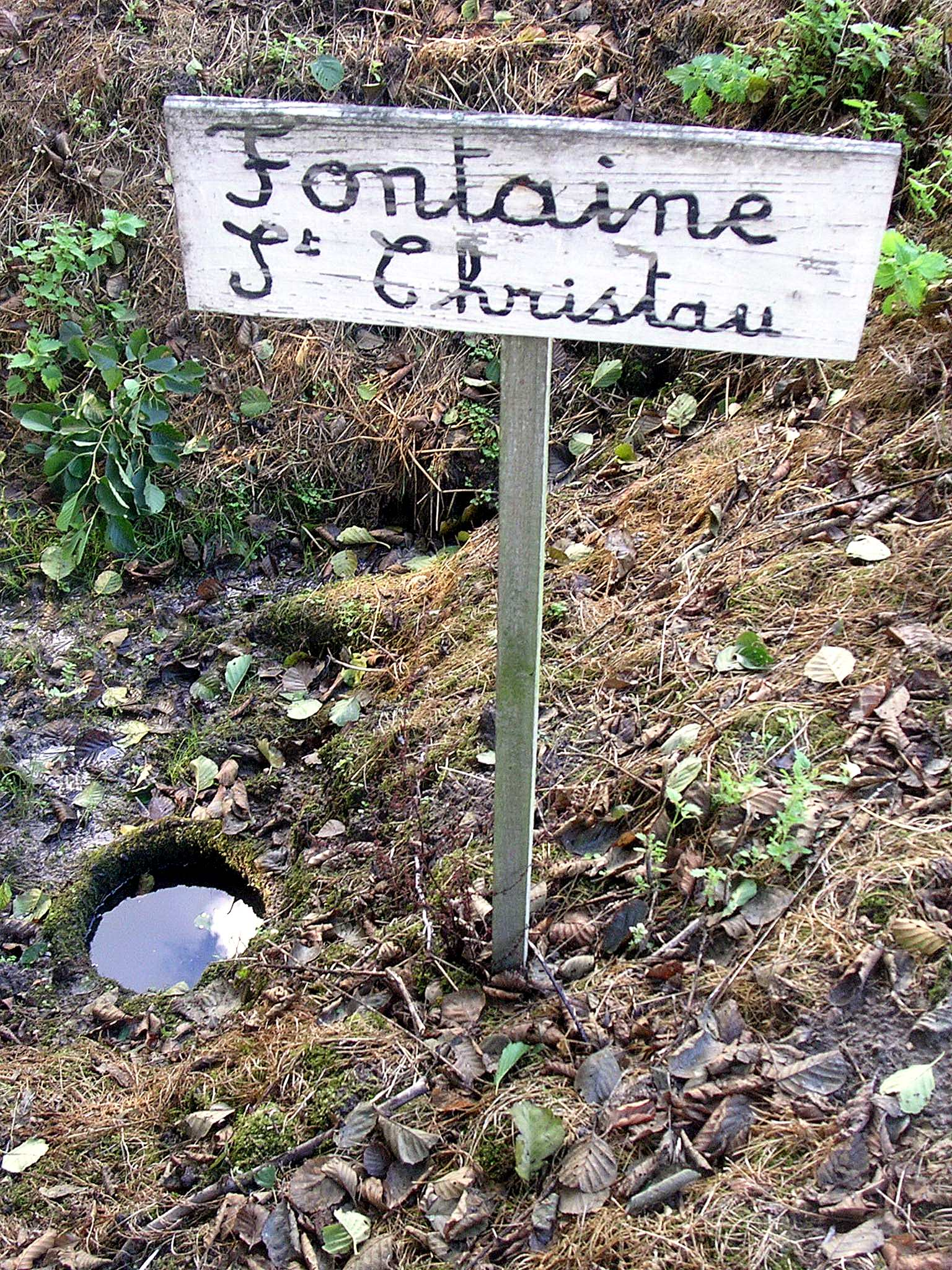 Fontaine Saint-Christau, à proximité de l'église du même nom, aux vertus prédendument miraculeuses, dans la commune de Benquet, dans le département français des Landes